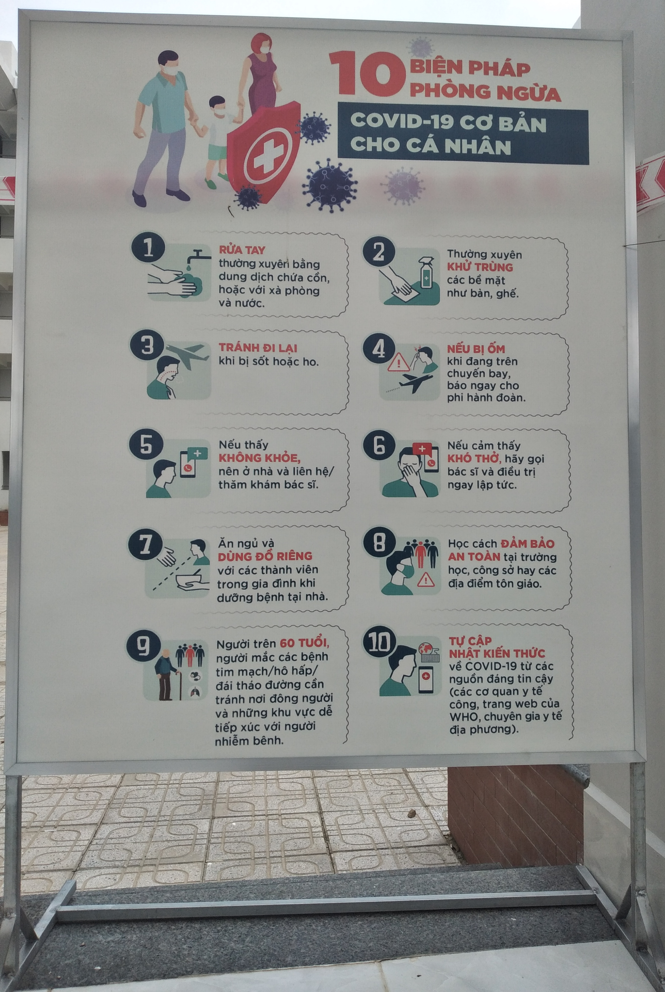 Bảng thông báo 10 biện pháp phòng chống covid 19 của bộ y tế